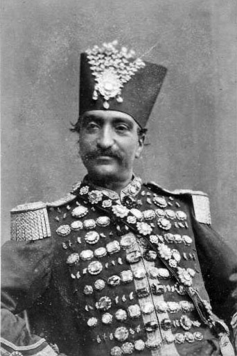 Севрюгин. Насреддин-шах Севрюгин также был приглашен к Насреддин-шаху в качестве личного фотографа, получил титул хана и стал именоваться Антуан-хан Севрюгин. Севрюгин сделал прекрасную фотографию шаха на фоне знаменитого Павлиньего трона.